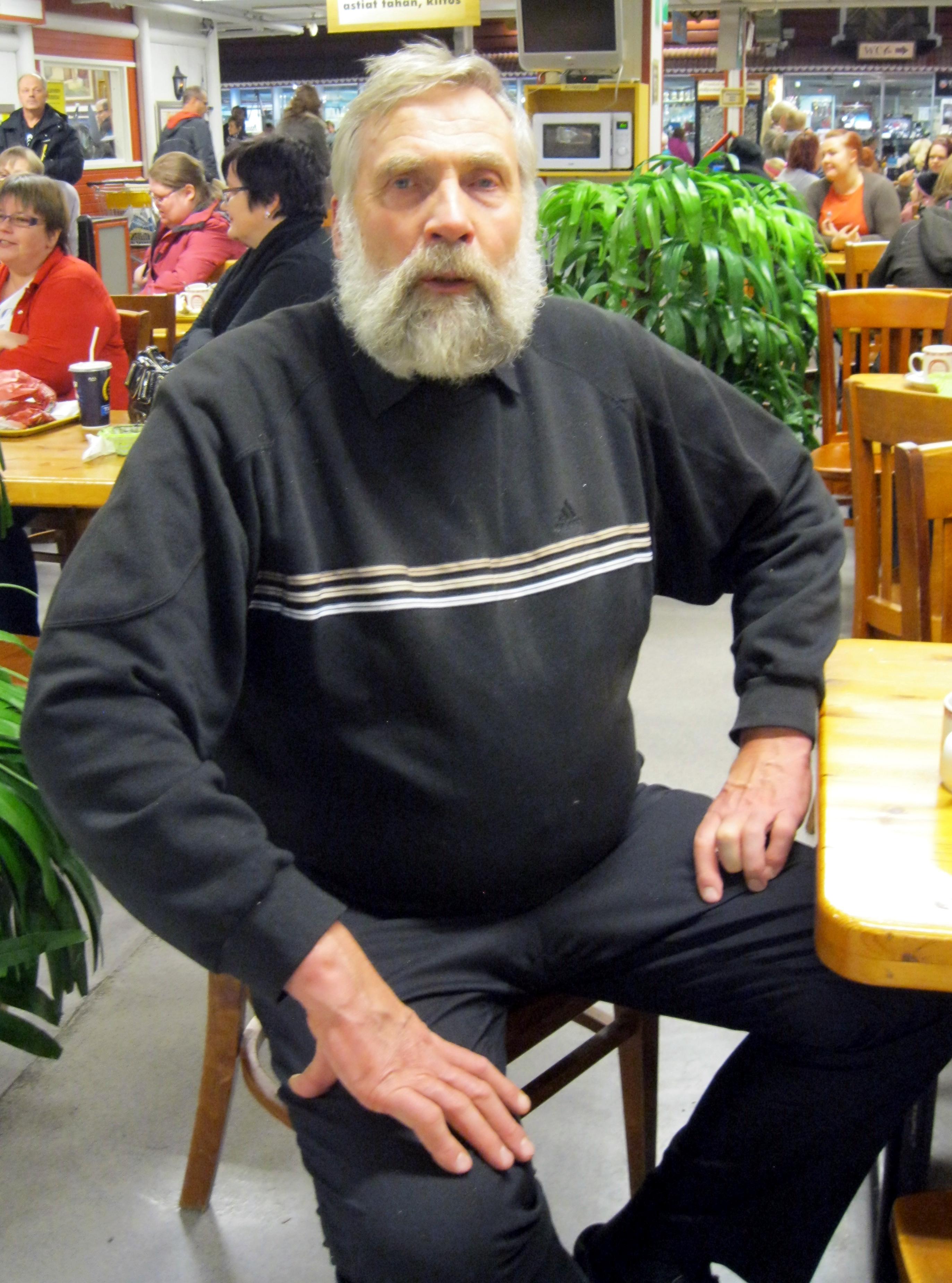 Juha Mieto, marraskuussa 2014 Veljekset Keskisen kyläkaupassa.